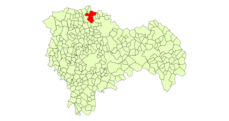 Localización de Atienza en Guadalajara (España)